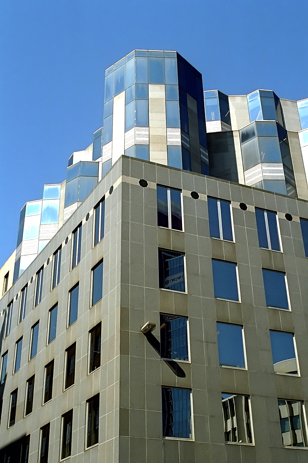 Belgique - Bruxelles - Place Surlet de Chokier - Siège de la Communauté française de Belgique (Architecture postmoderne en Belgique - Atelier d'architecture de Genval - 1986-1992)